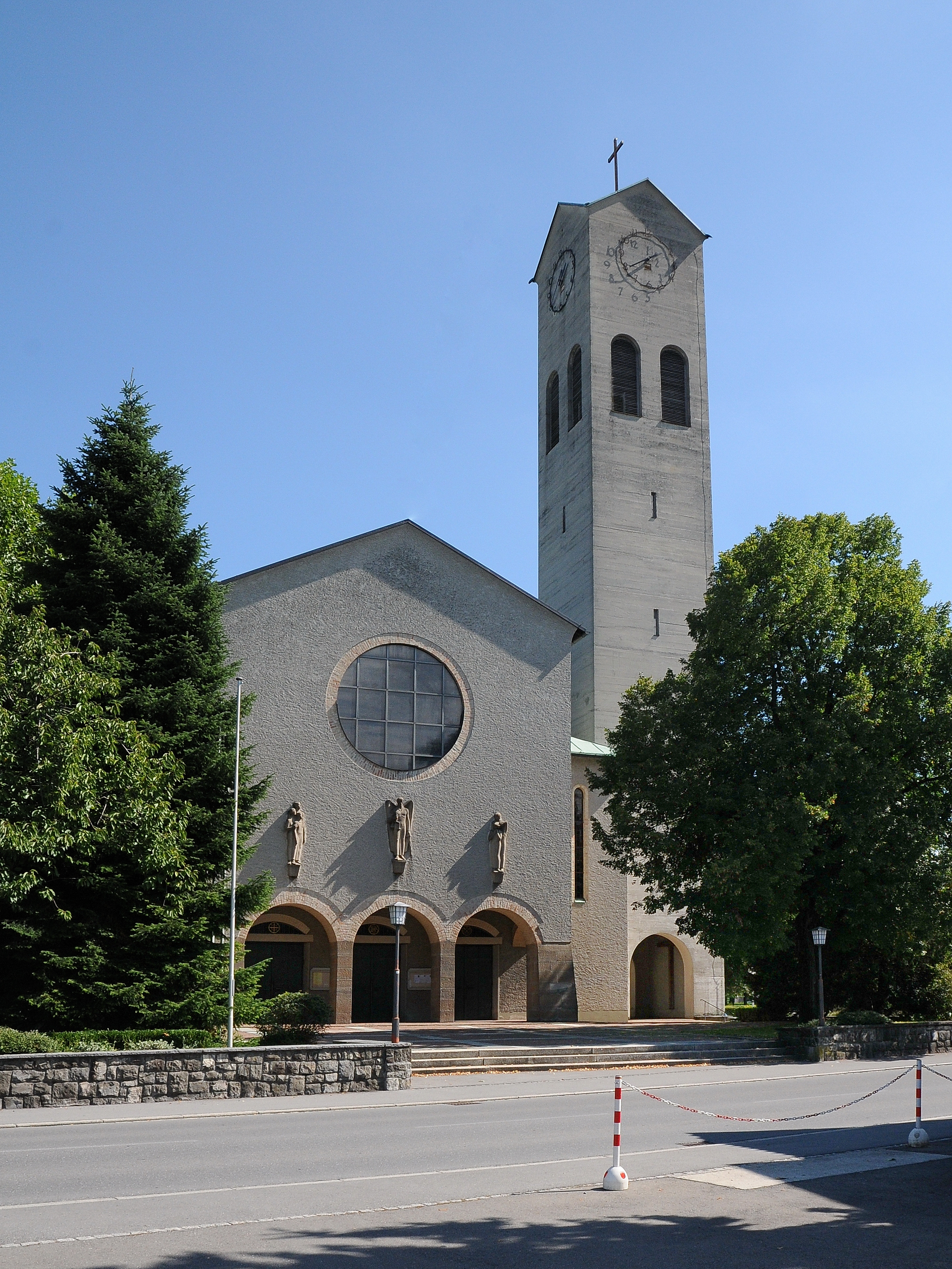 Kath. Pfarrkirche Zum göttlichen Erlöser an der Maria-Theresien-Straße 85 in Lustenau.